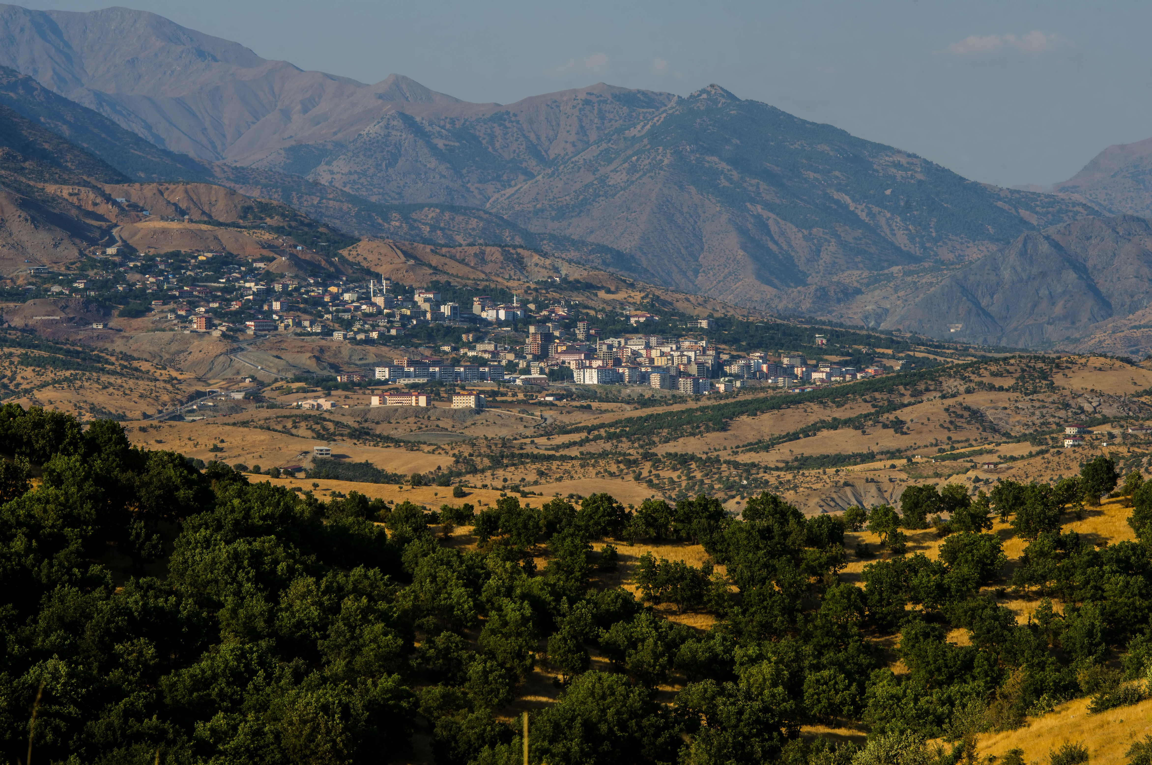 Kurdî: Qulpa Amedê